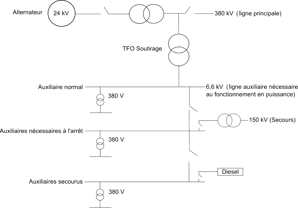 Différentes sources d'énergie électrique d'une centrale.